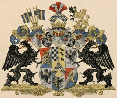 Mellini suguvõsa krahvivapp